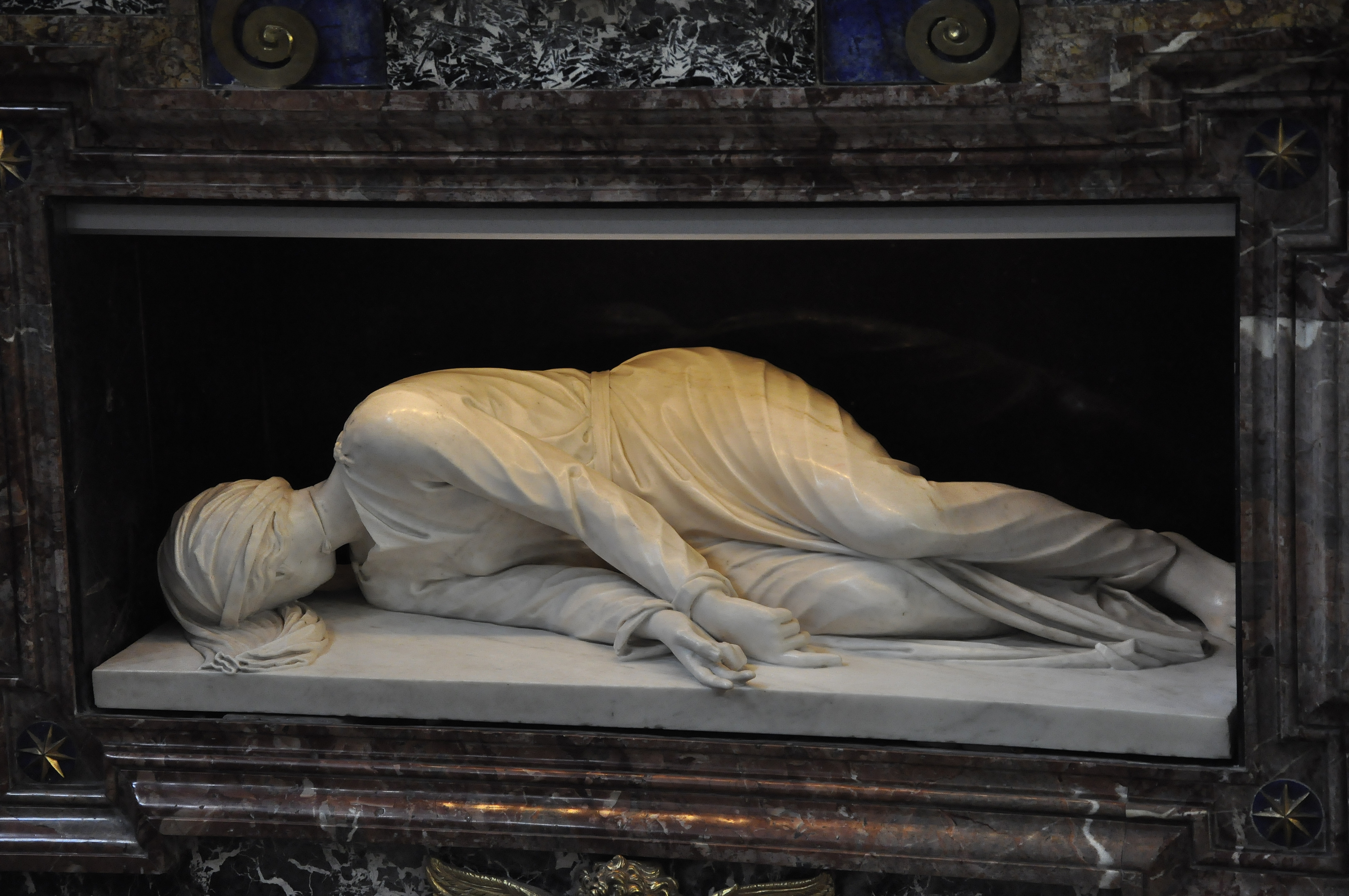 Sint-Cecilia van Stefano Maderno in de basiliek van Santa Cecilia in Trastevere, Rome